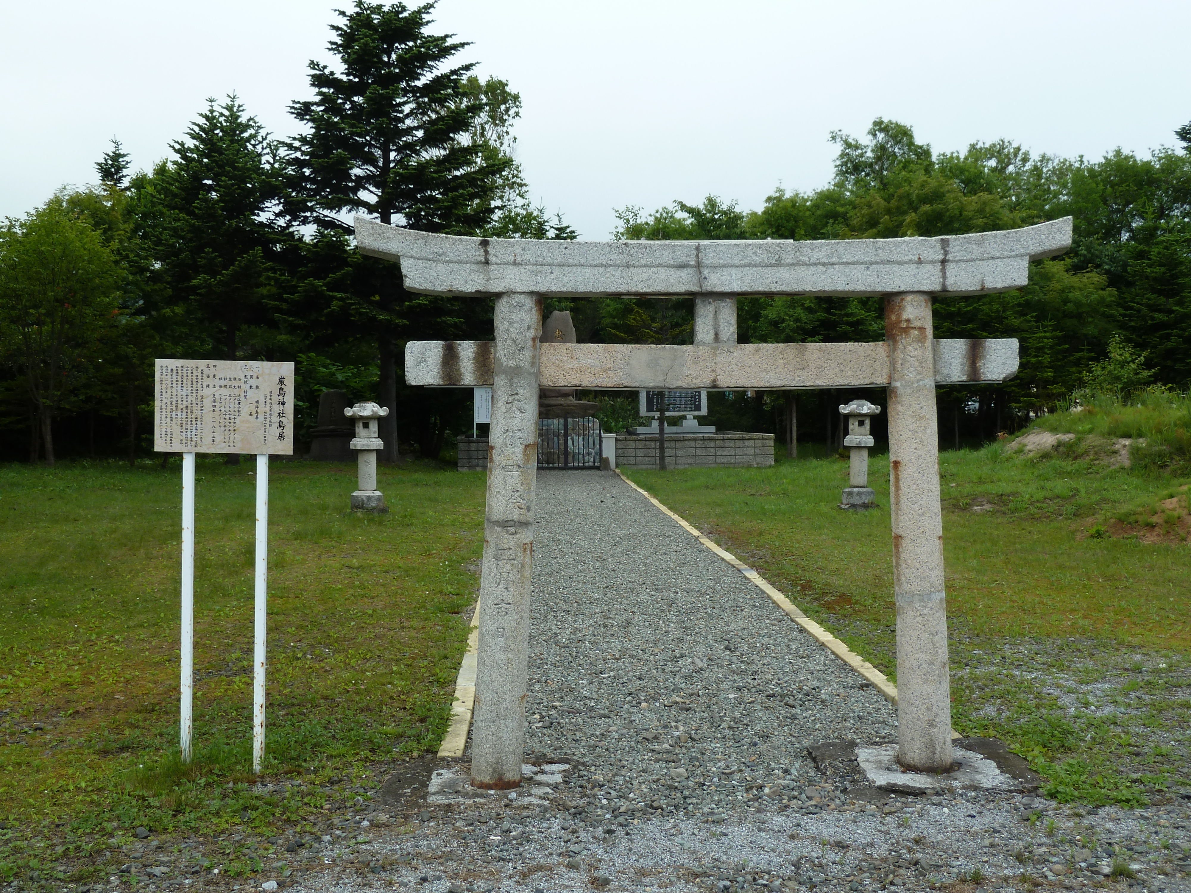 枝幸町にある厳島神社鳥居